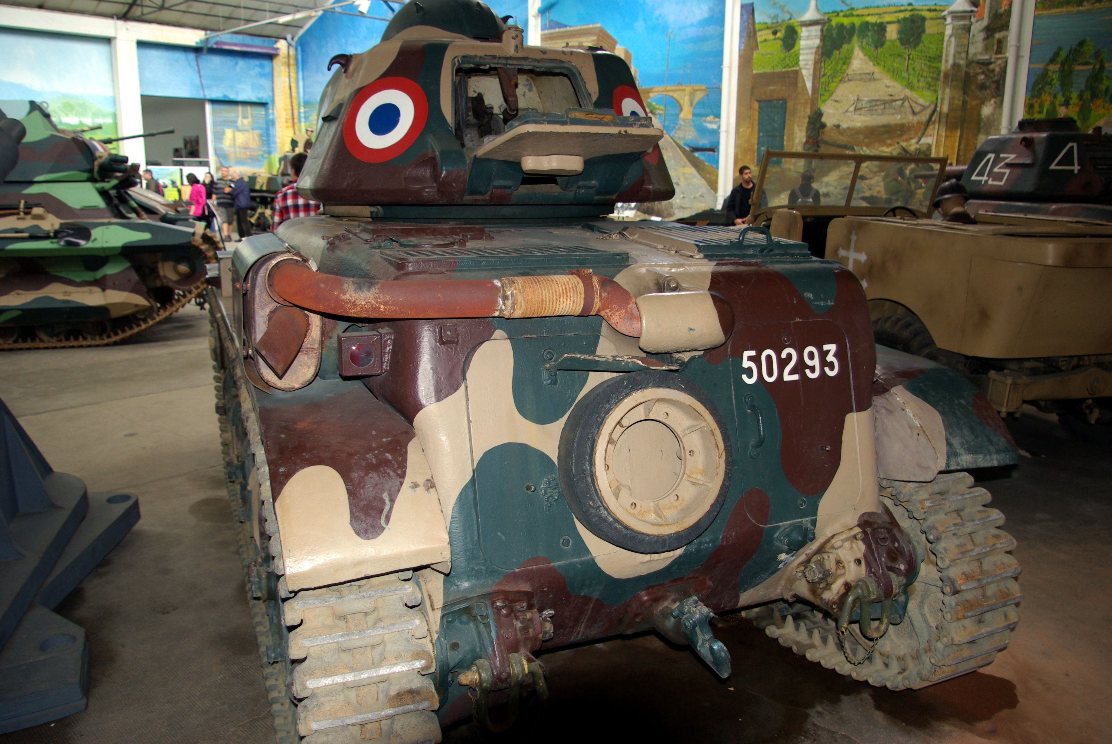 Char Renault 35 exposé au Musée des Blindés de Saumur.